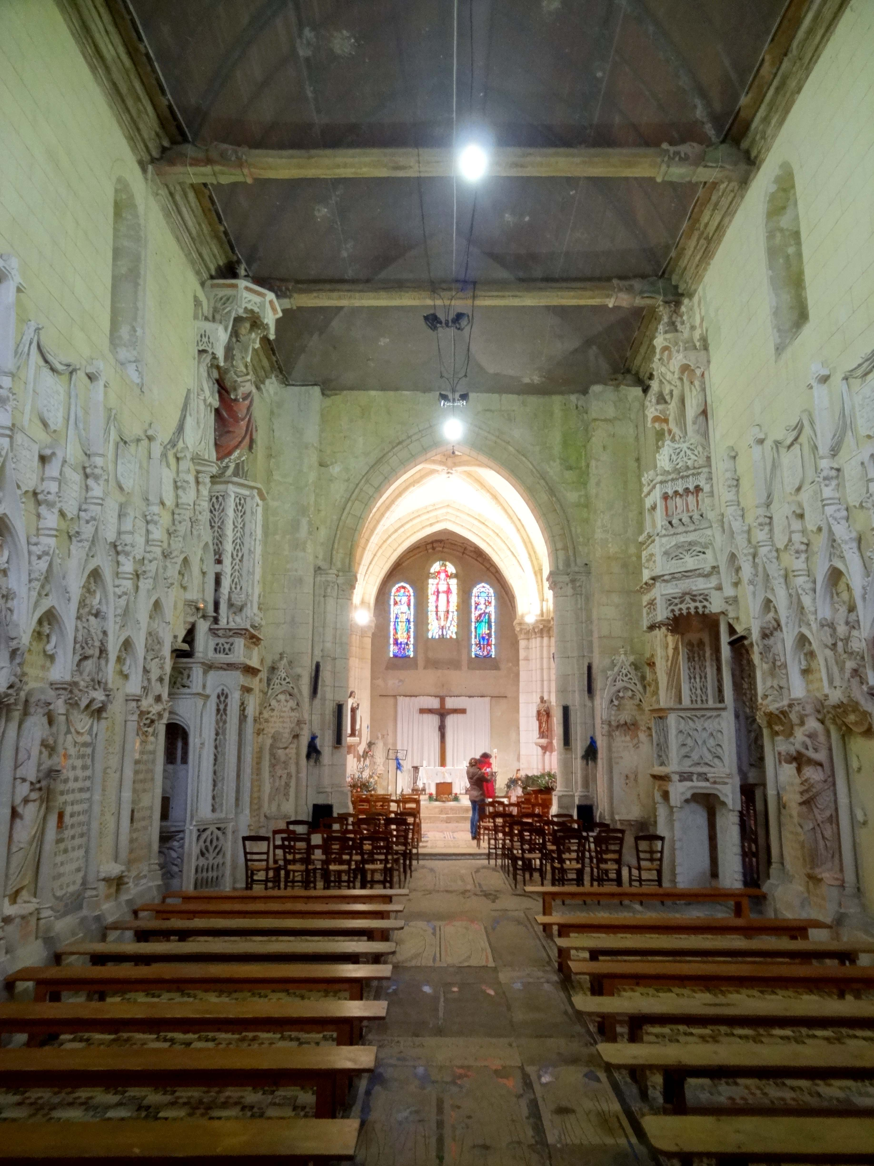 Intérieur de l'église - voir titre.